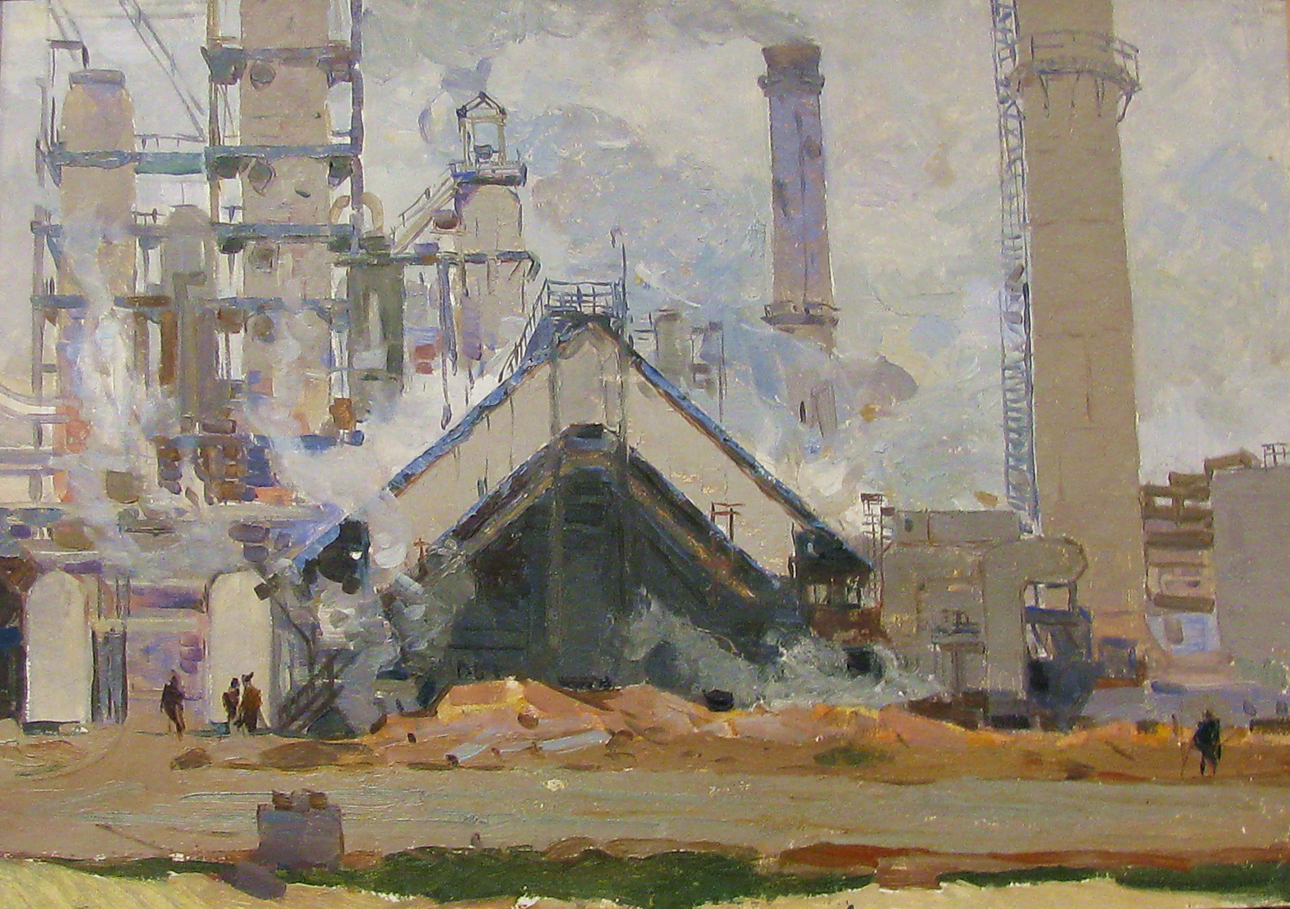 Міхаіл Блішч. Капры Салігорска, Кардон, алей